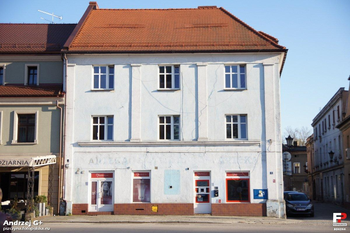 Rynek 17. Od zawsze na parterze tej kamienicy mieściła się apteka, działająca pod różnymi nazwami. Pierwszym właścicielem apteki był Krystian Erdmann Pedel, przybyły do Pszczyny w 1768 r. z Bolesławca. Na przełomie XIX i XX w. właścicielem apteki był Eugen Friedländer. Syn Eugena Friedländera, to znany francuski malarz i grafik Gotthard Johnny Friedläander, który urodził się 21.06.1912 r. właśnie w tej kamienicy. W latach po II wojnie światowej w kamienicy mieściła się apteka zwana "starą". Dziś od jakichś dwóch lat apteka, niestety została zamknięta, a budynek niedawno nabył prywatny inwestor - niestety, nie są znane jego plany wobec budynku.